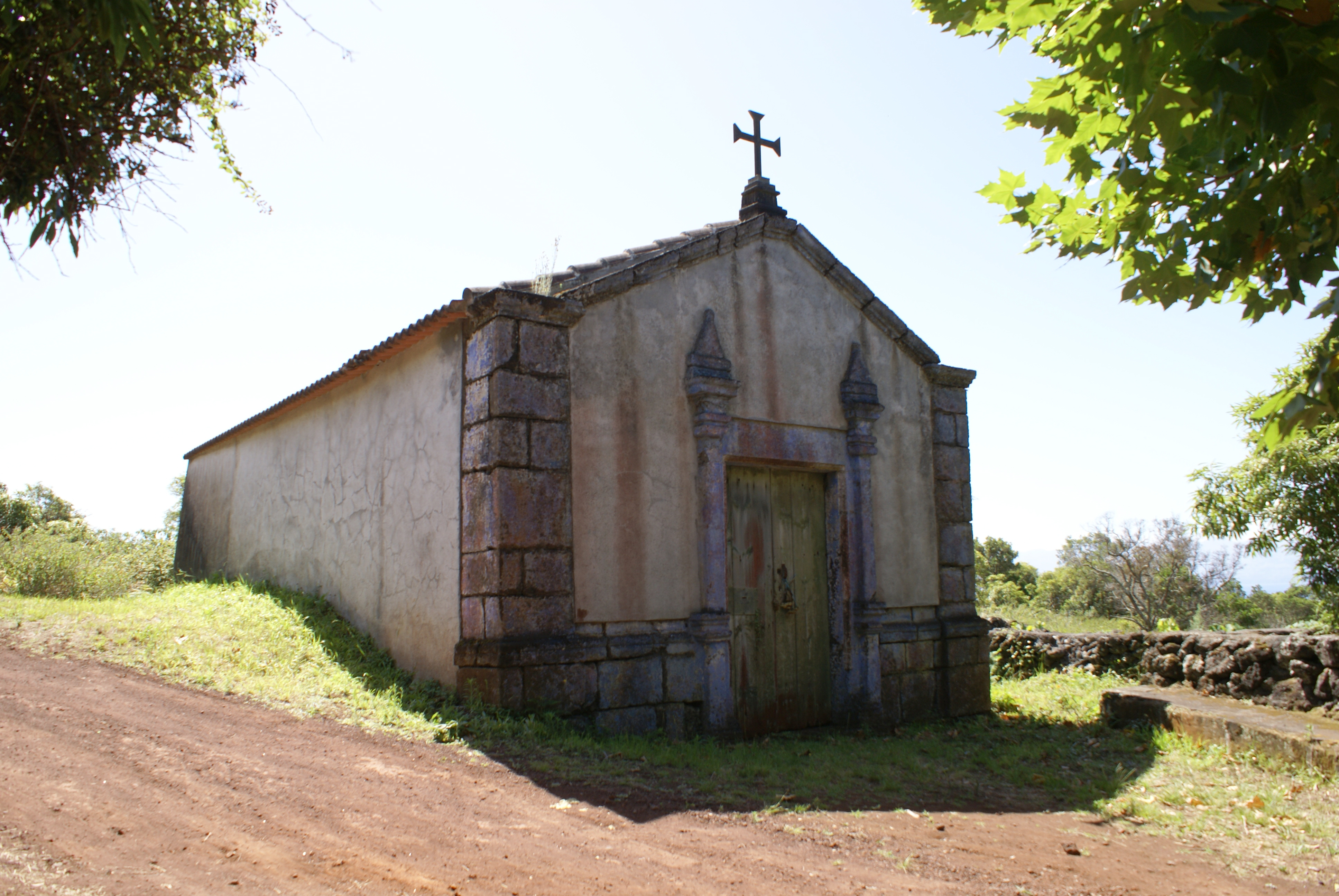 Ermida de Jesus, Maria, José da Urzelina, Urzelina, Velas, ilha de São Jorge, Açores